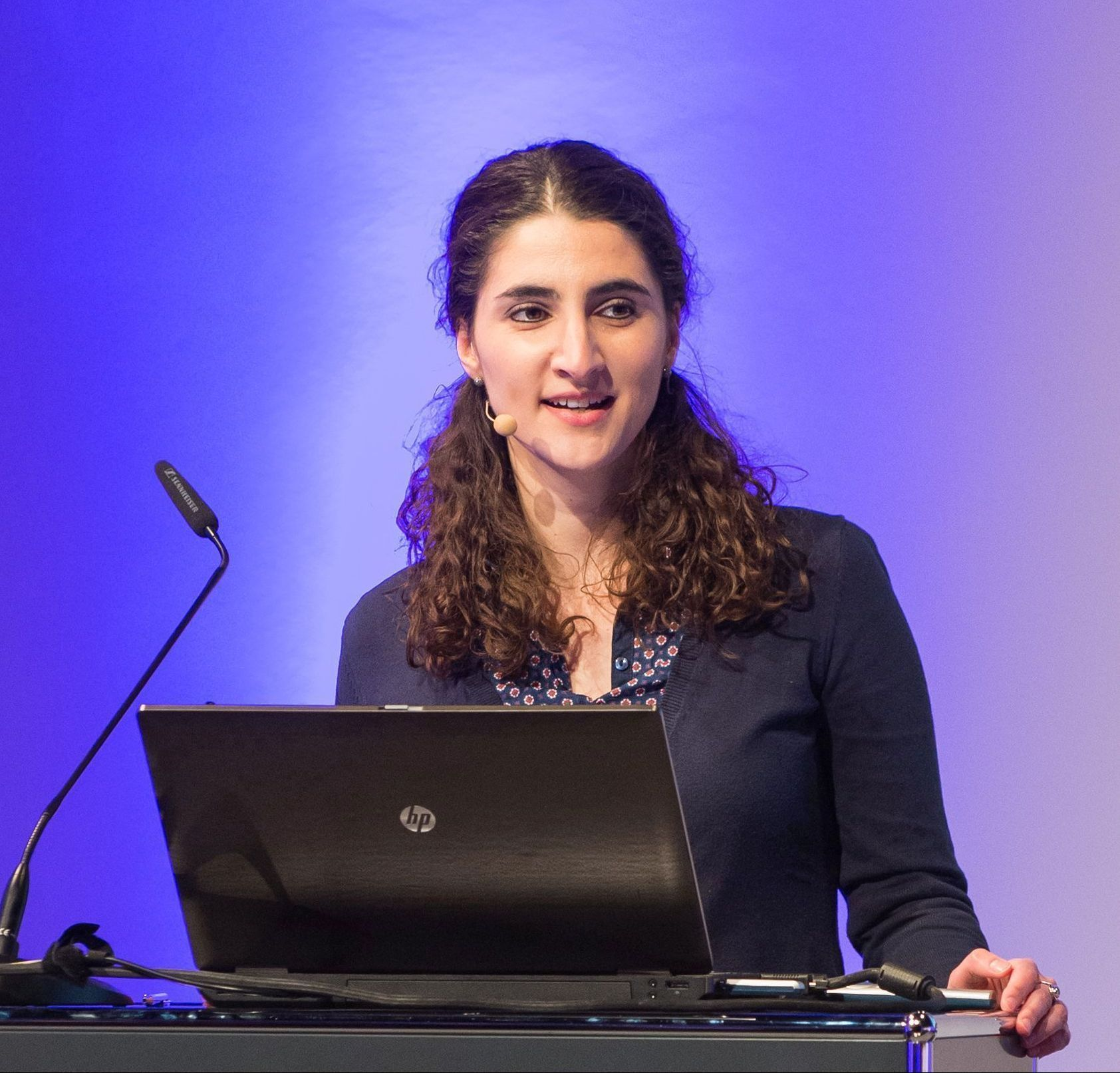 Dr. Yasemin Shooman bei der Veranstaltung "Schützt höhere Bildung vor Rassismus und Antisemitismus?" am 20.2.2014 in der Akademie des Jüdischen Museums Berlin.